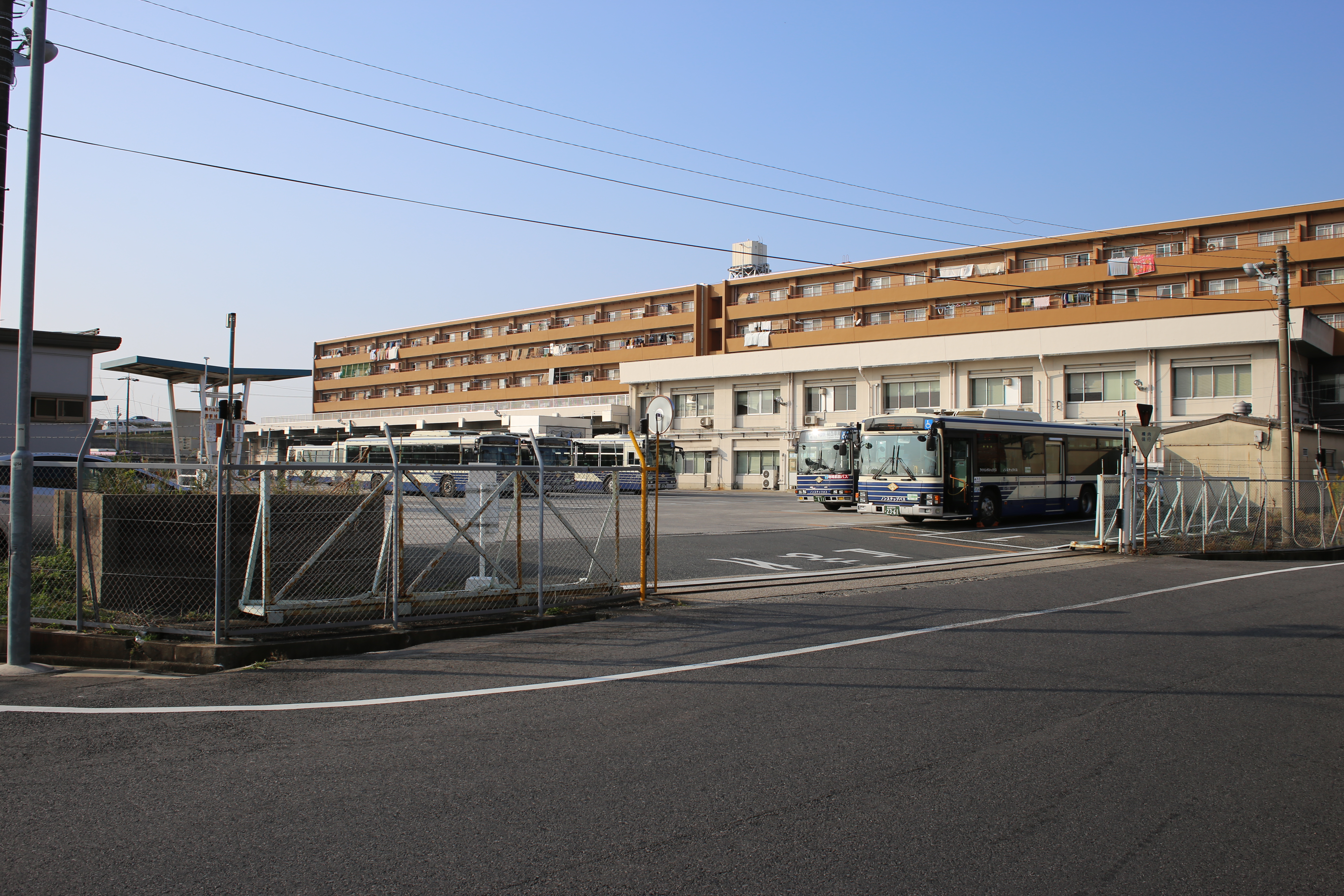 名古屋市中村区稲西町の名古屋市営バス稲西営業所を東側公道南側より撮影